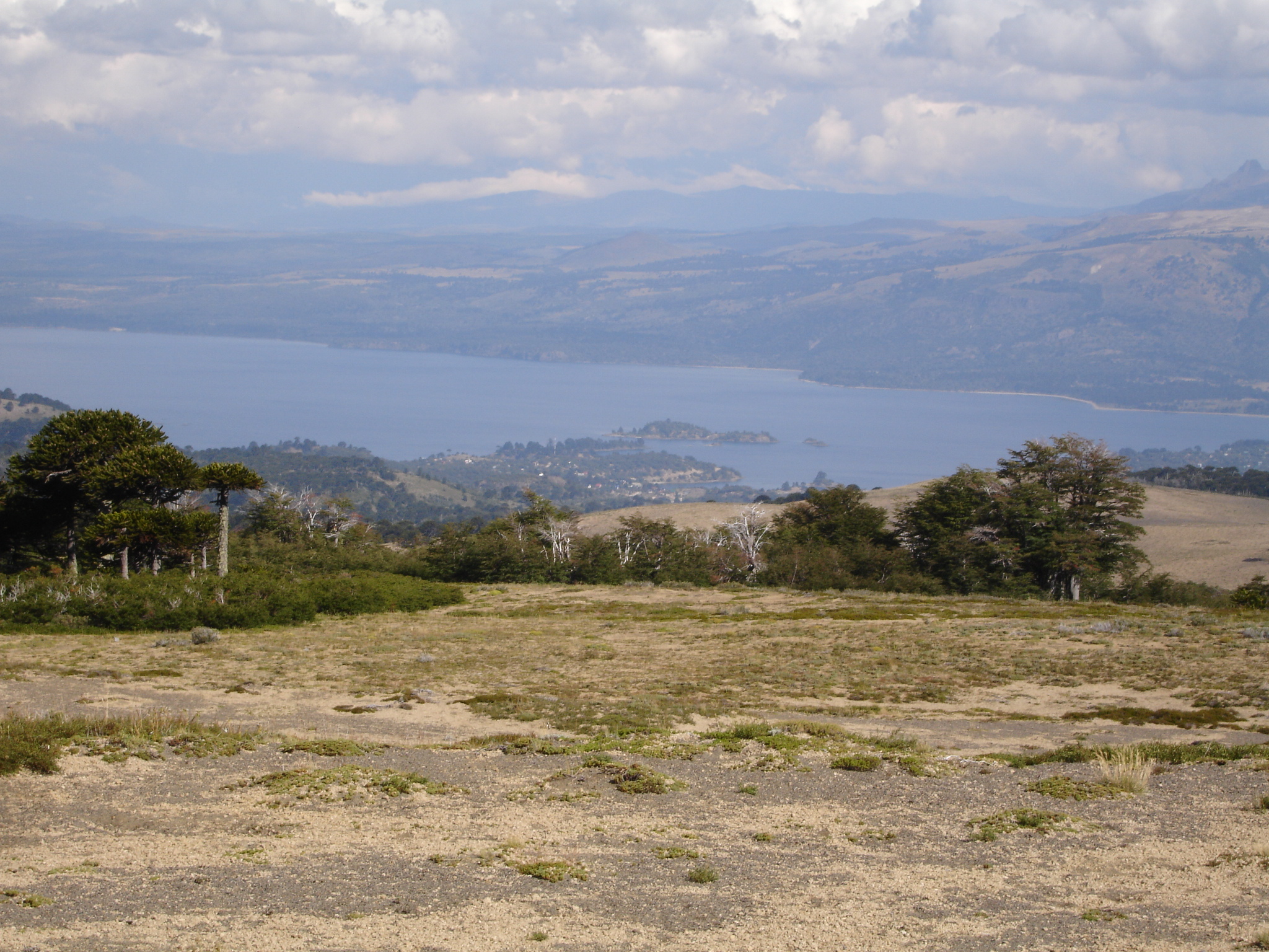 Vista del Lago Aluminé, desde el volcán Batea Mahuida, Villa Pehuenia.